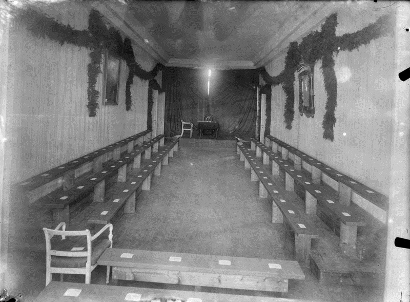 Eidsvollsbygningen, interiør, forsamlingssal, Rikssalen.